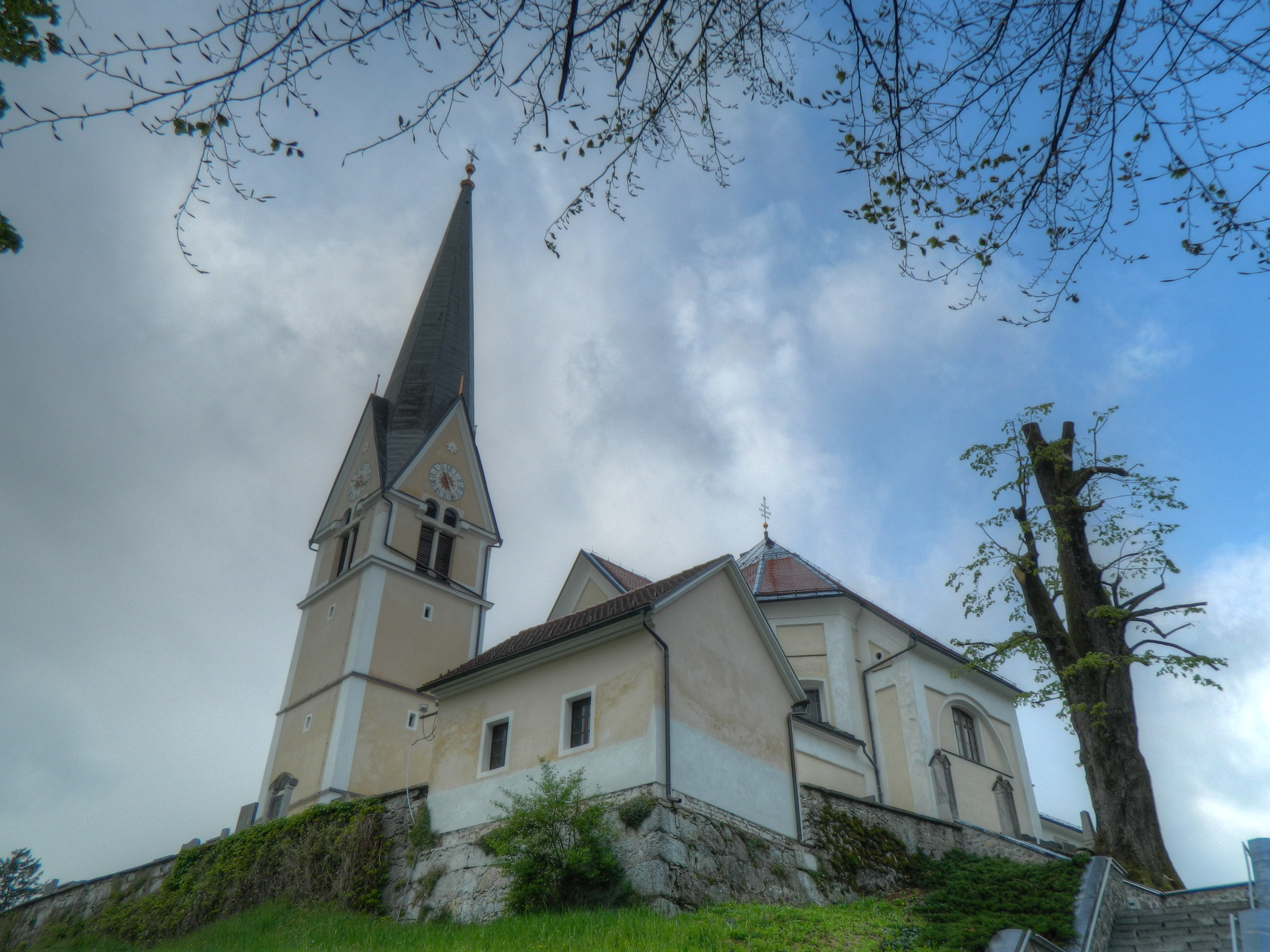 Slika cerkve Marijinega rojstva v Homcu, HDR.